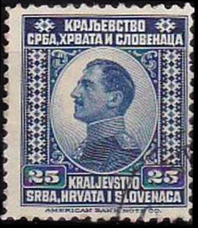 Почтовая марка Королевства СХС, кронпринц Александр